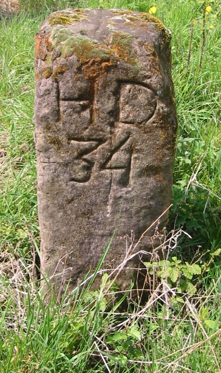 Grenzstein Nr. 34 der Heckendalheimer Umring-Markierung von 1802-1805